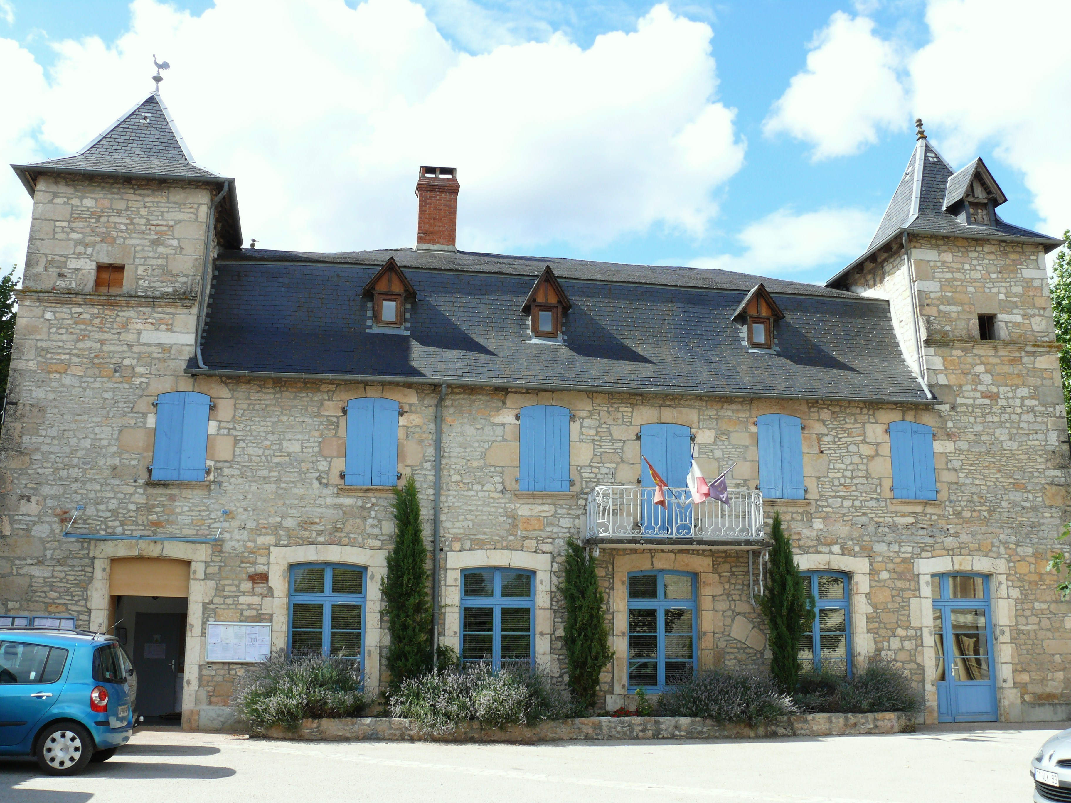 Assier - Mairie